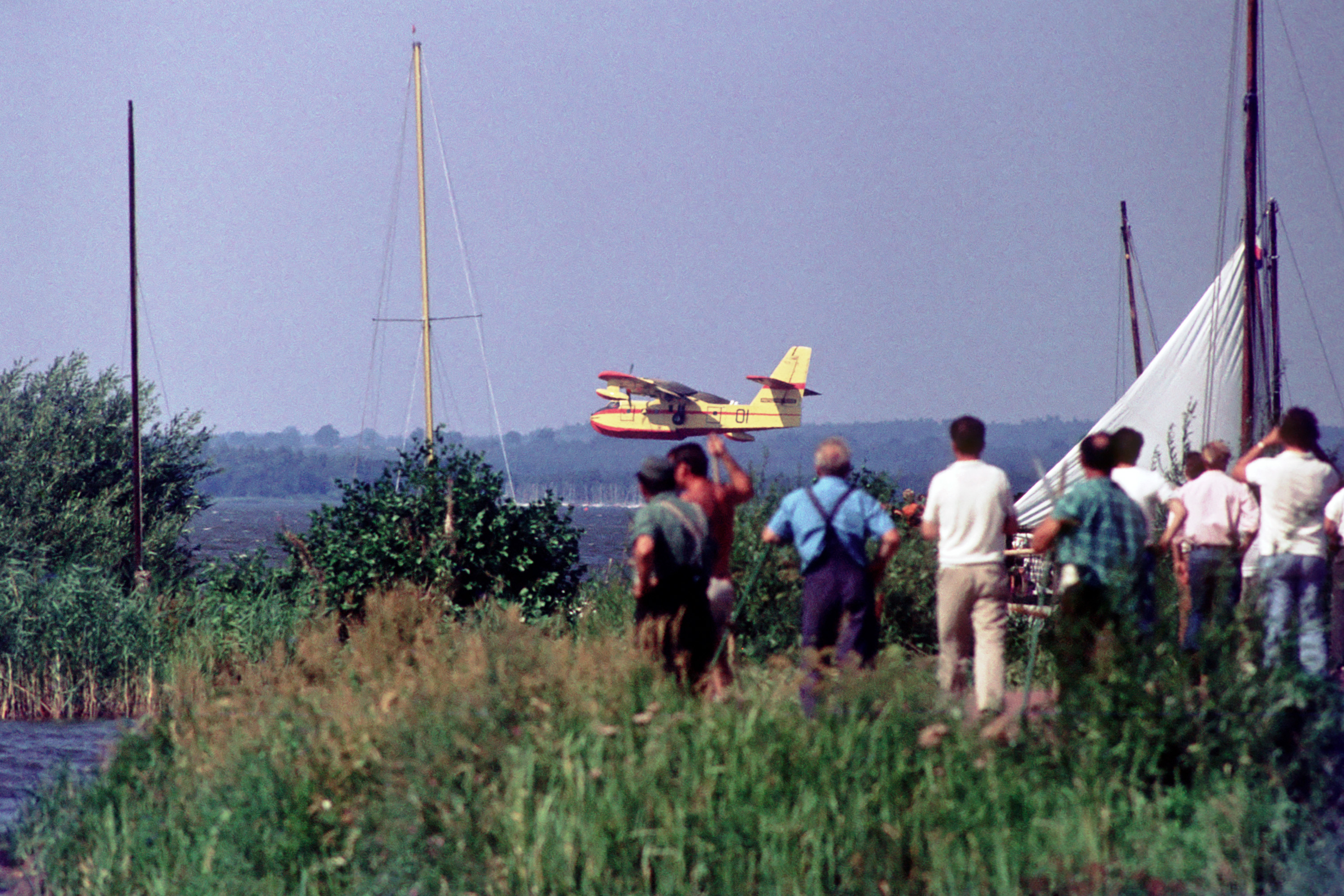 Löschflugzeug bei der Wasseraufnahme auf dem Steinhuder Meer 1